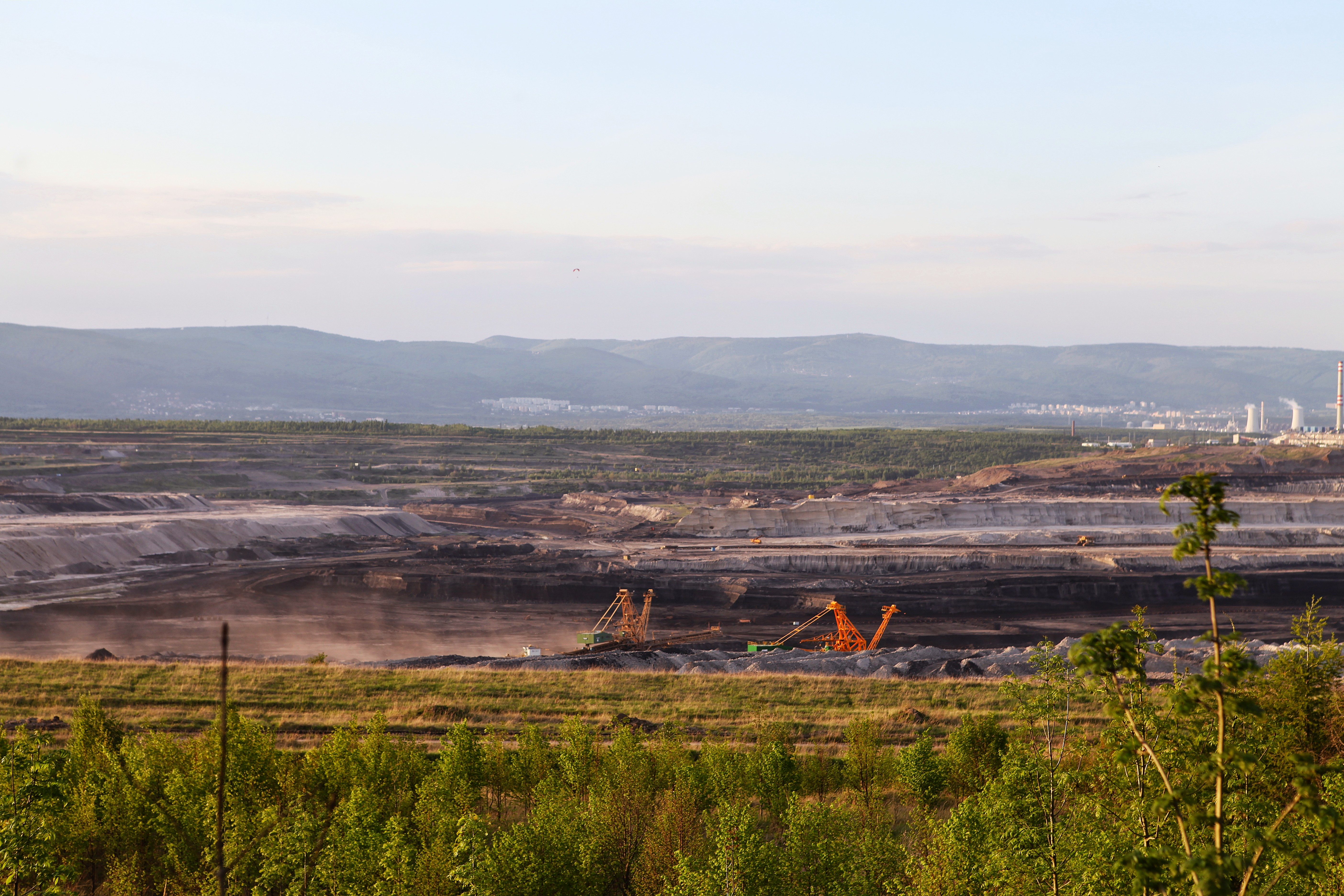 Lom Vršany